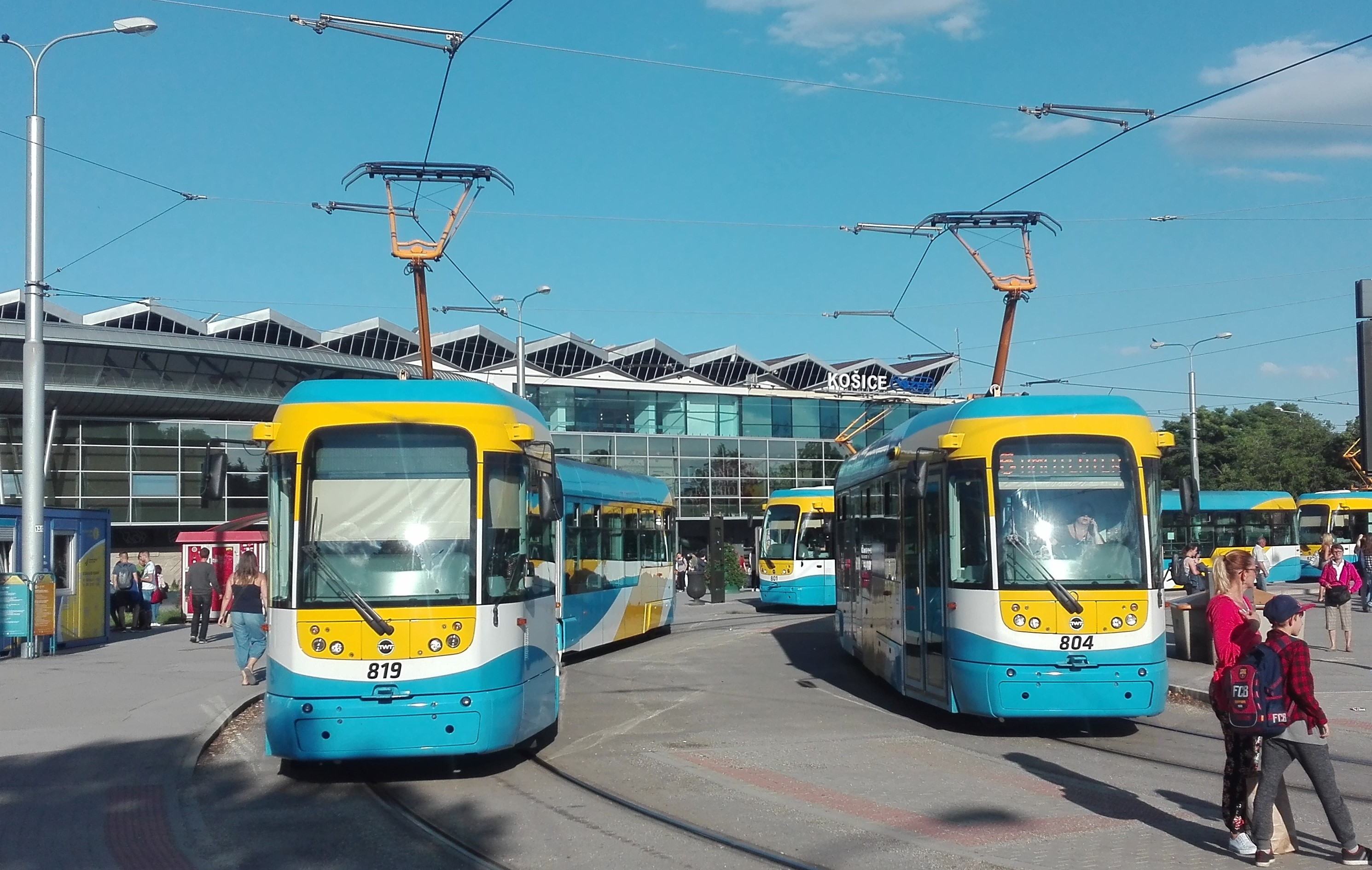 Staničné námestie, Košice, električky Vario2+, 2018